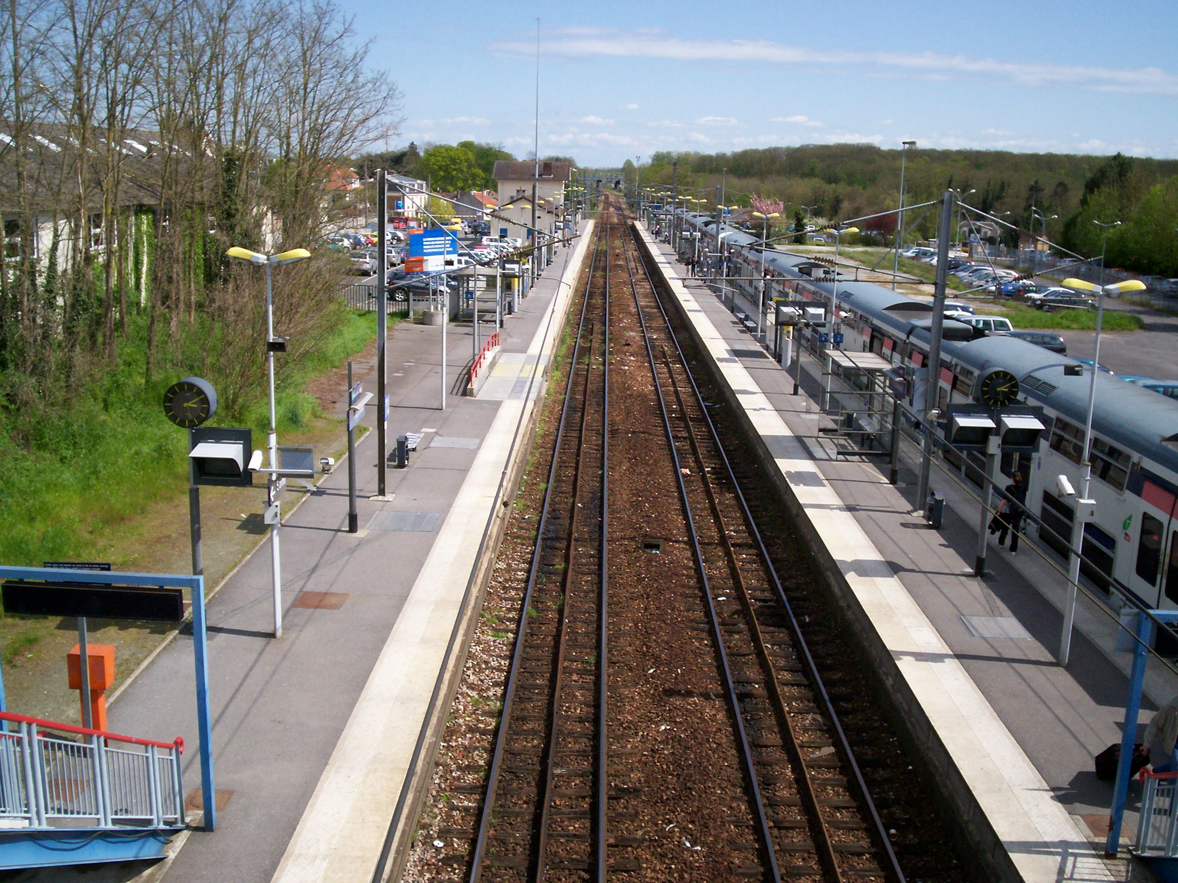 Gare de Tournan vue aérienne